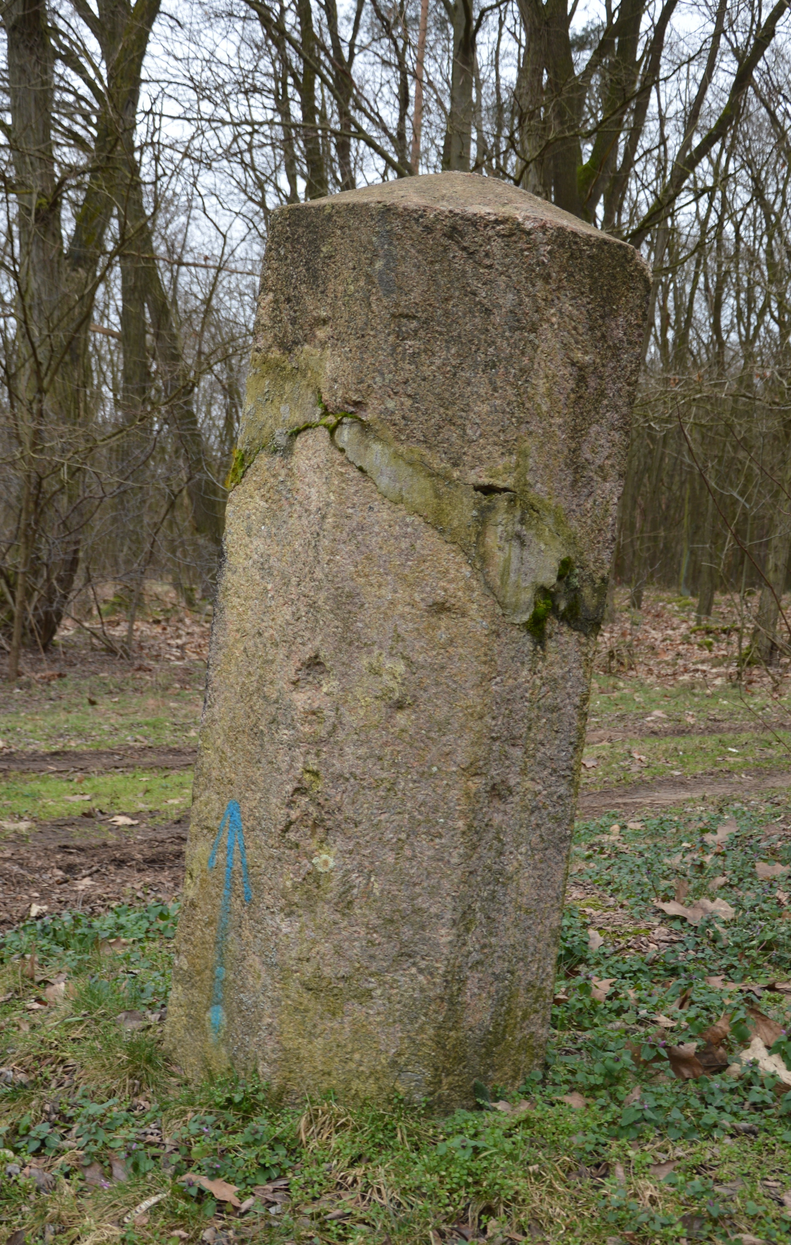 Distanzstein am Stern bei Möckern